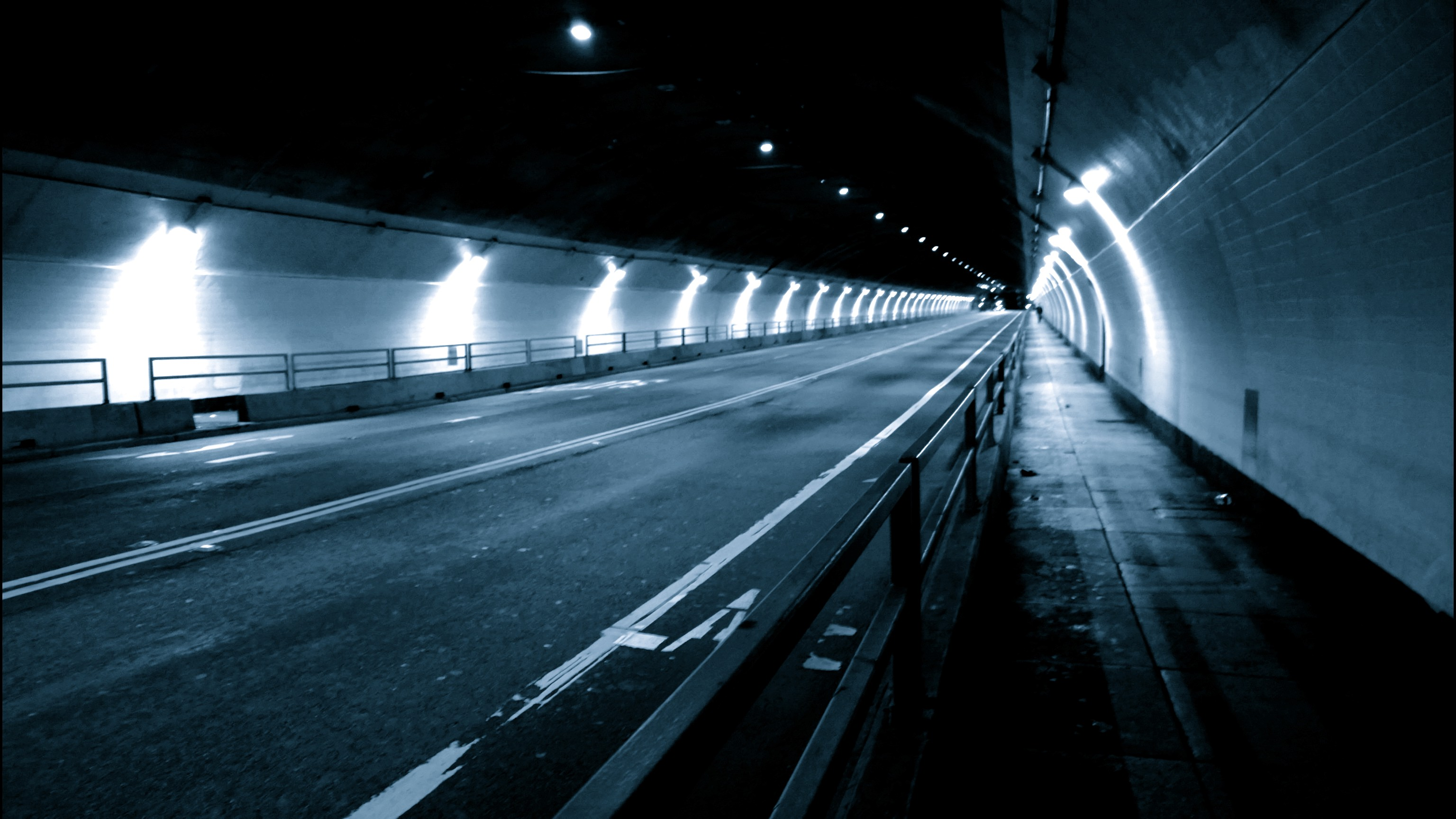 San Francisco Stockton street tunnel